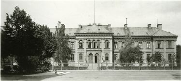 Veterinärinstitutet vid Karlavägen. Byggnadsår 1880. Arkitekt Edvard von Rothstein. Rivet 1911